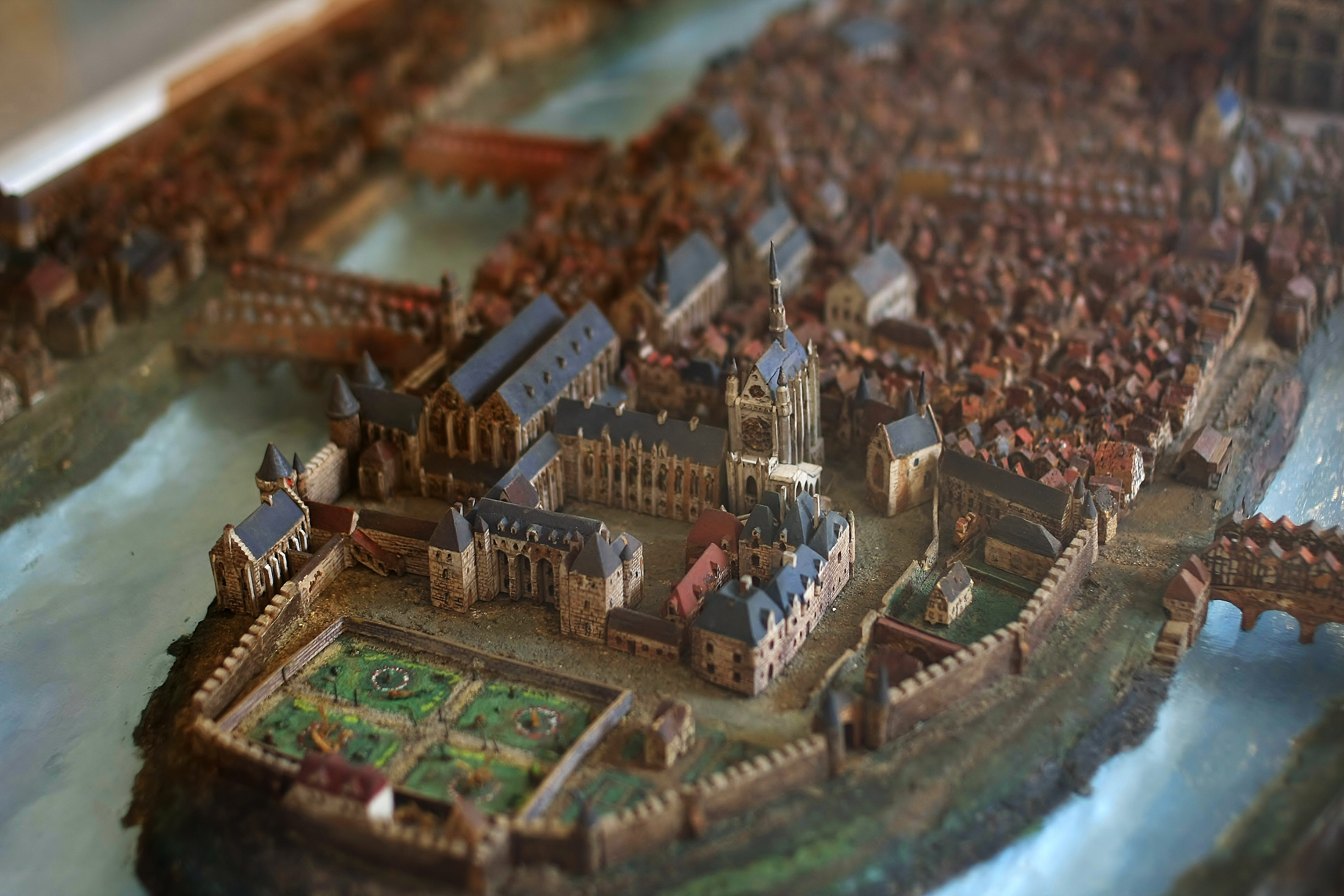 Maquette représentant l'île de la Cité et ses alentours à Paris en France vers la fin du XVIe siècle date de la maquette : fin du XIXe siècle la photo se focalise sur le palais de la Cité Photo : 5 mars 2011 au musée Carnavalet par Adrian Scottow